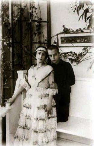 Матильда Кшесинская с сыном Владимиром 1916